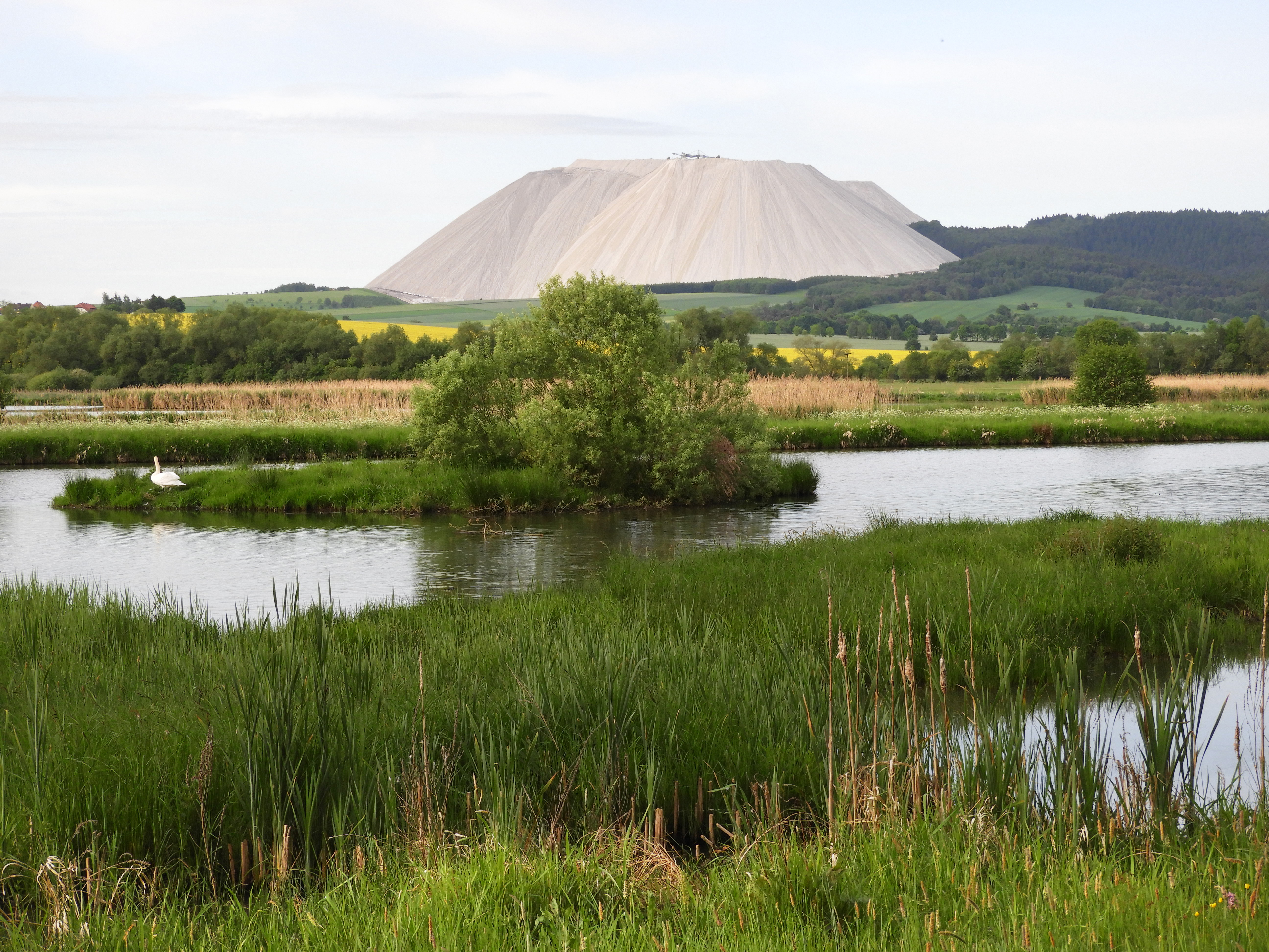 Blick von der Aussichtsplattform in südwestliche Richtung über das Schutzgebiet auf den "Monte Kali", die Abraumhalde des Kalibergbaus bei Heringen. Das Gebiet hat seit 2002 den Schutzstatus als FFH-Gebiet 5026-350 "Rhäden bei Obersuhl und Bosserode" und ist zugleich ein Teilbereich des Vogelschutzgebietes 5026-402 "Rhäden von Obersuhl und Auen an der mittleren Werra". This is a picture of the protected area listed at WDPA under the ID 165150 537' / N50°56.505'